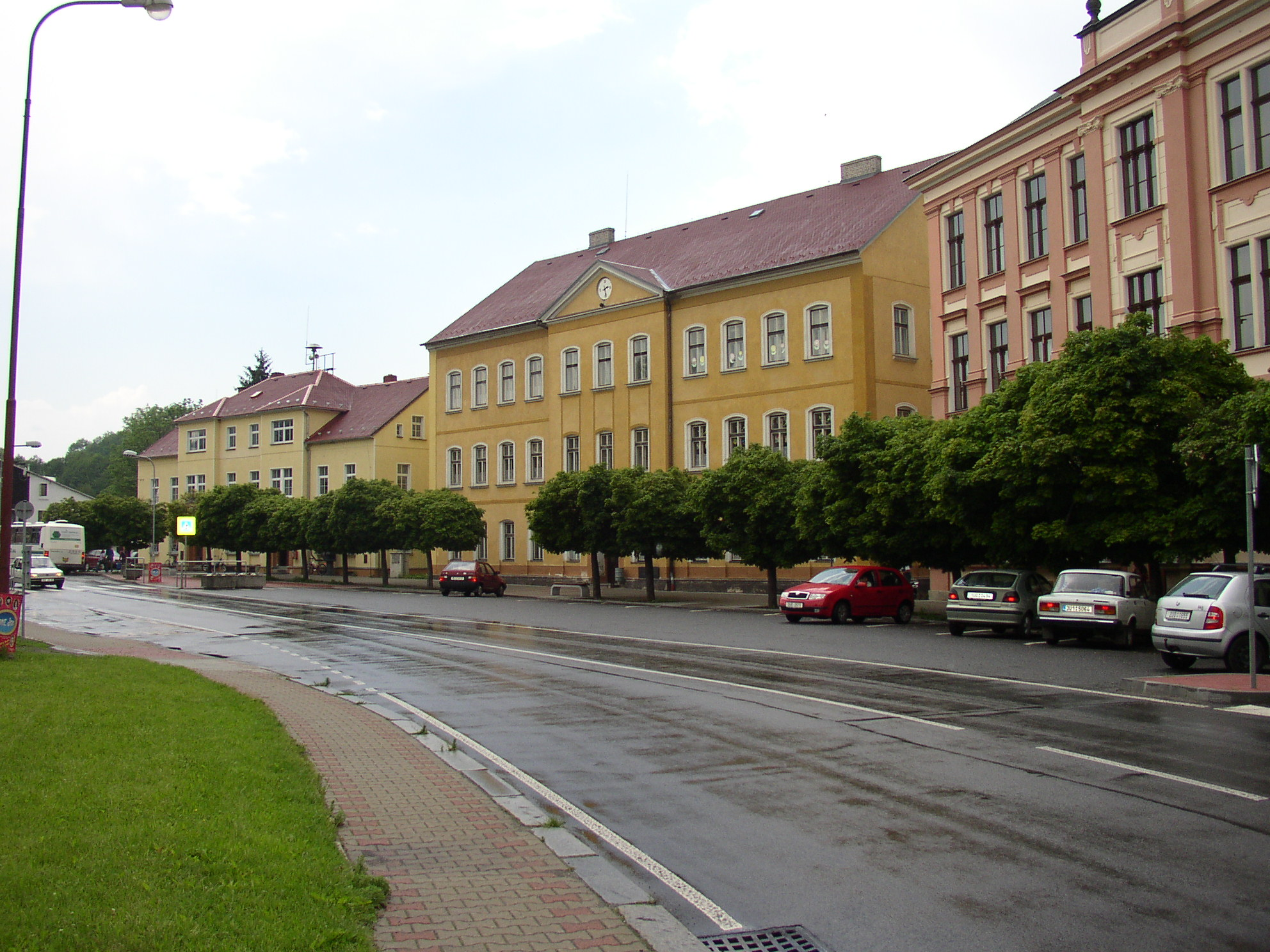 Obecní úřad a škola v Dolním Podluží, Dolní Podluží, okres Děčín, Česká republika